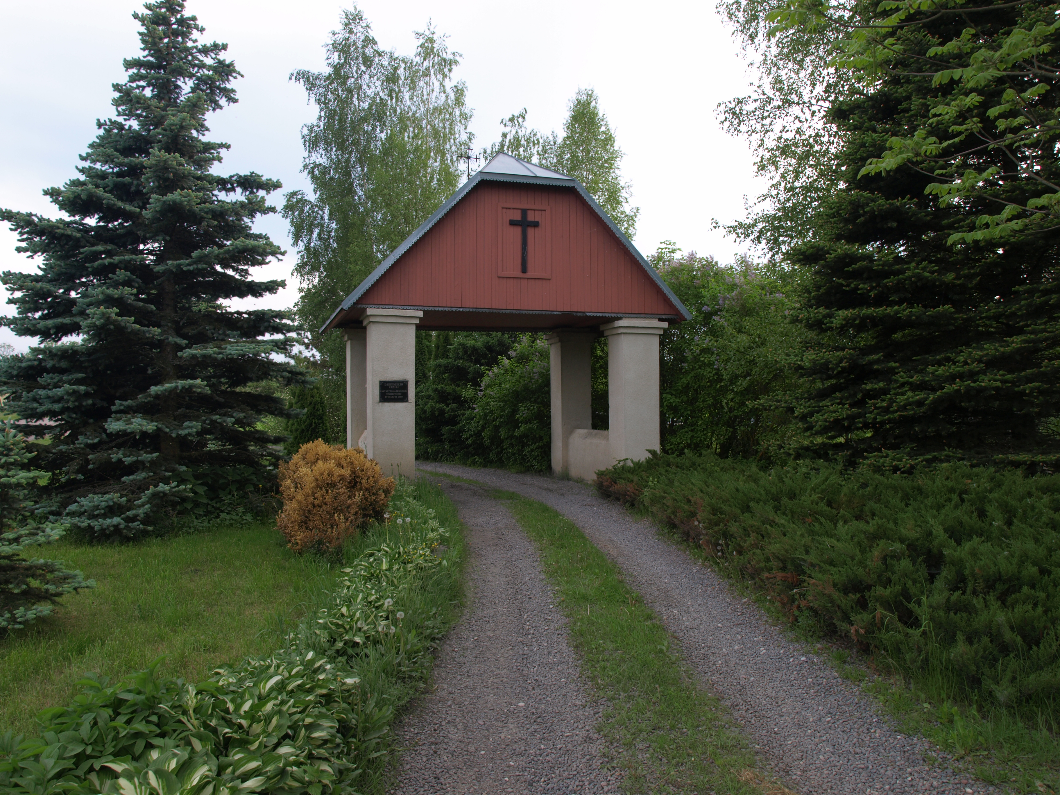 Darsūniškis